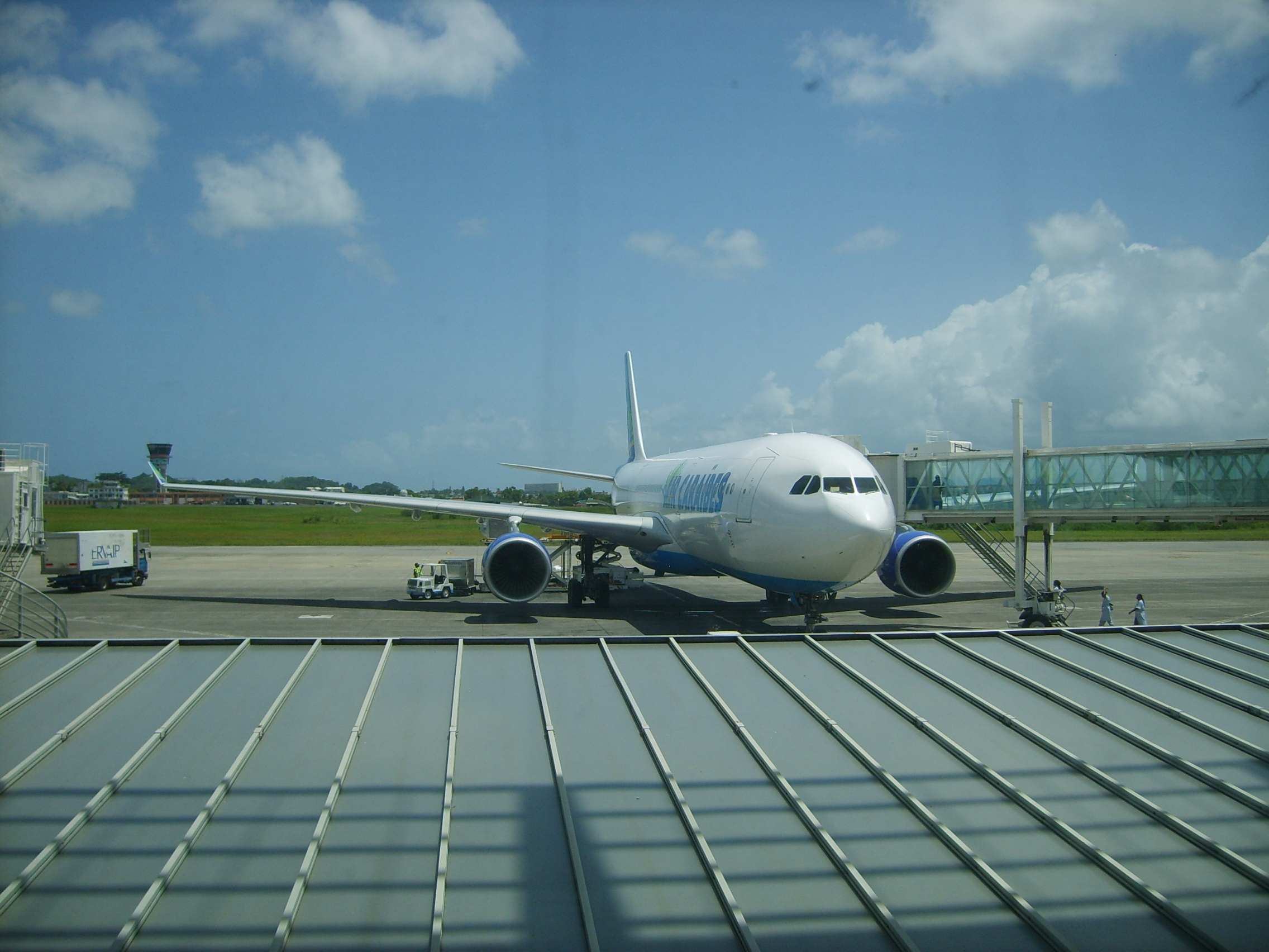 Avion "Air Caraïbes" à l'aéroport de Pôle Caraïbes (Guadeloupe)